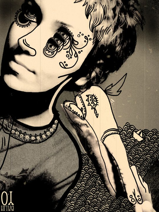 Dünya Atay'ın kendi çalışması